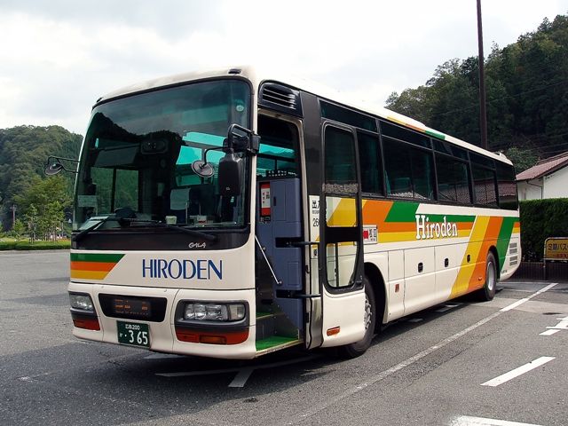 事業者: 広島電鉄 陸運登録: 広島200か・365 シャーシ: いすゞ自動車 KL-LV774R2 車体: いすゞバス製造 年式: 2001年 撮影場所: 道の駅ゆめランド布野